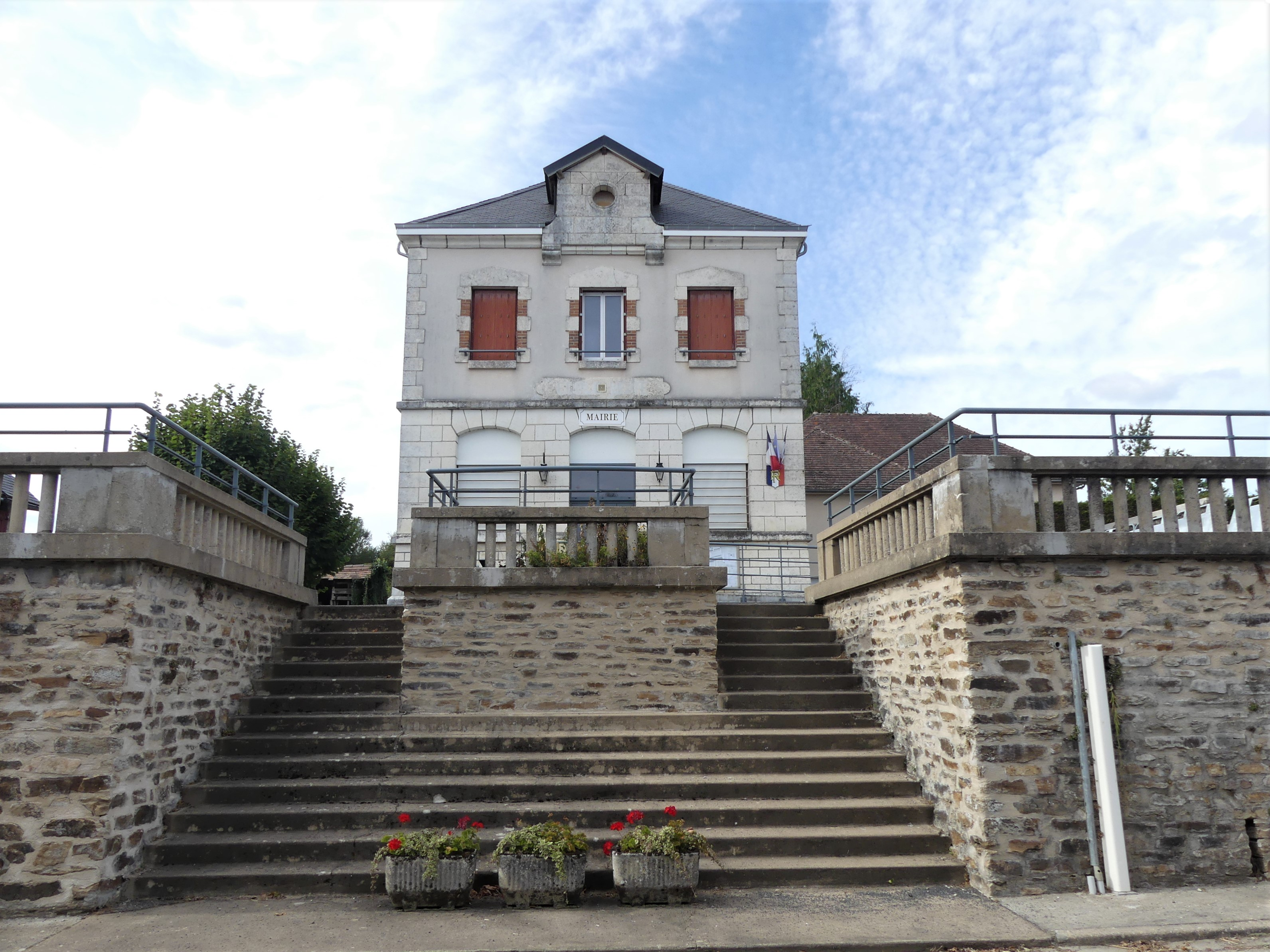 La mairie de Saint-Éloy-les-Tuileries, Corrèze, France.